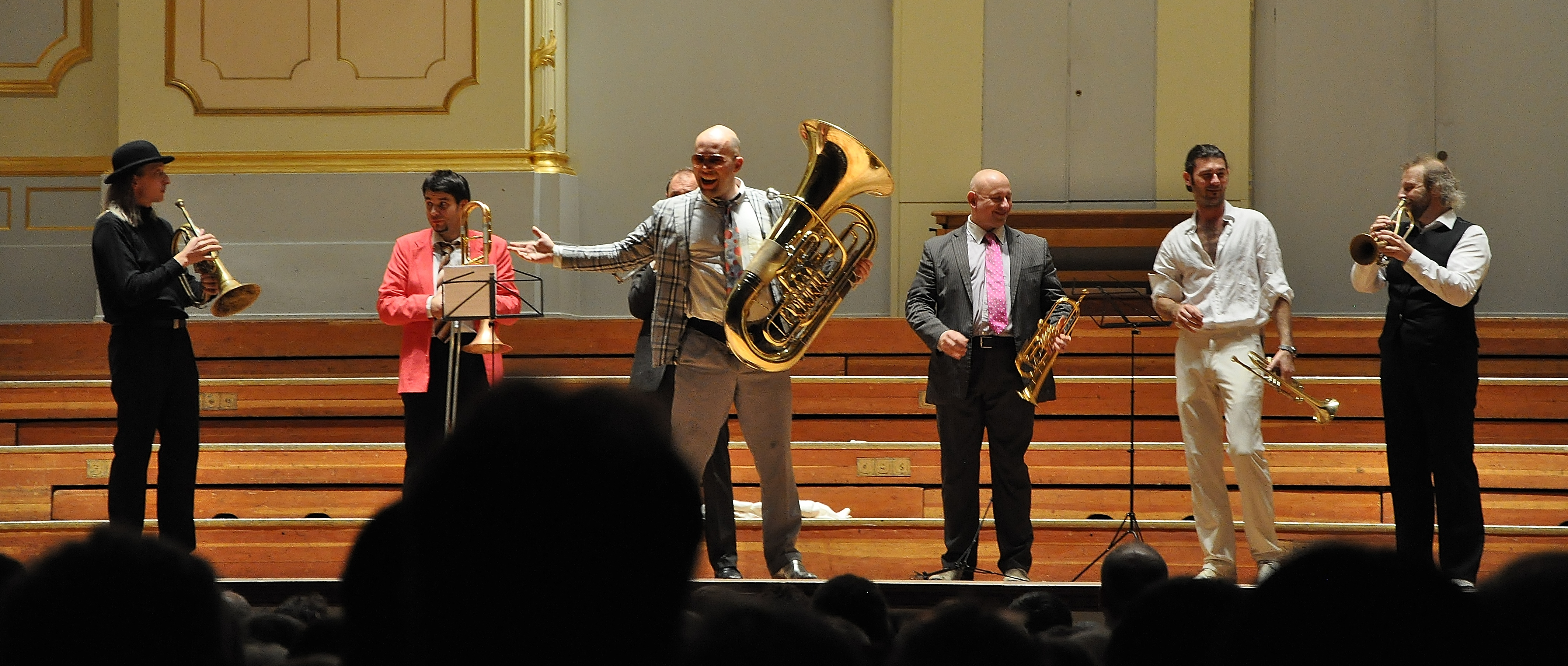 Mnozil Brass in Hamburg